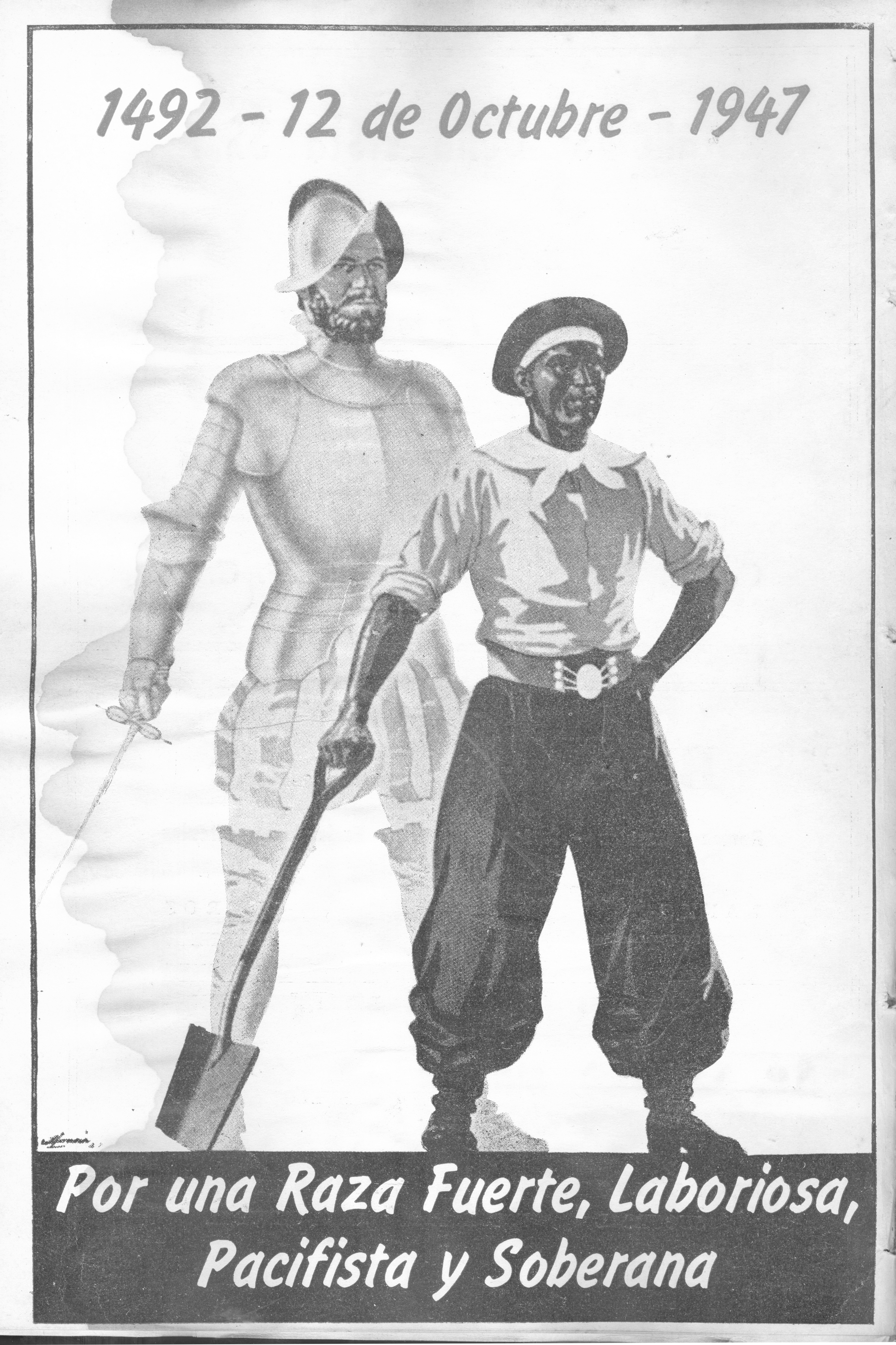 Revista Judicial nº180: "Por una raza fuerte, laboriosa, pacifista y soberana".